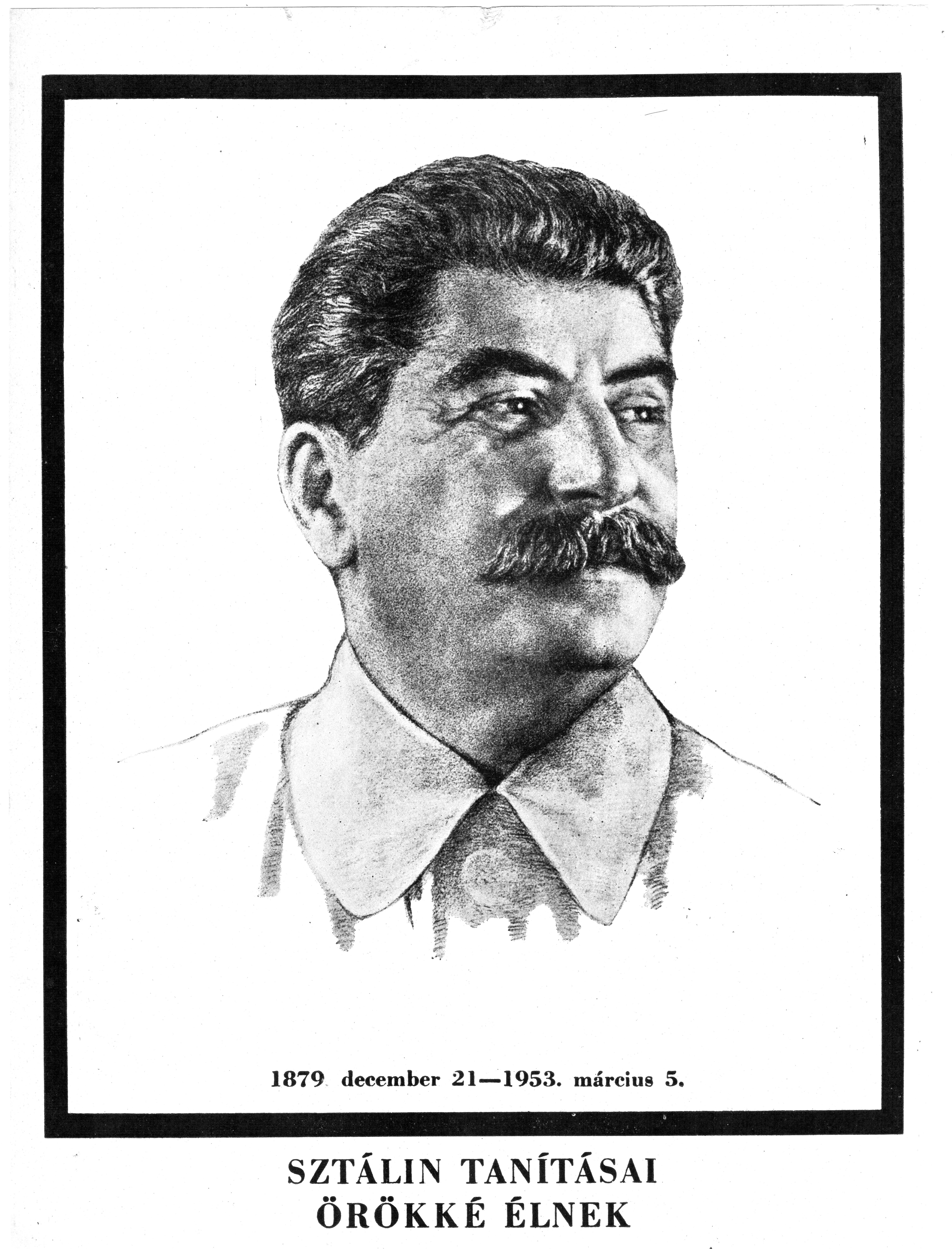 Joszif Visszarionovics Sztálin. A Magyar Állam által kiadott Gyászlap 1953 -bank közvetlenül Sztálin halála után. A gyászlapot 2012. október 28 -án szkenneltem.